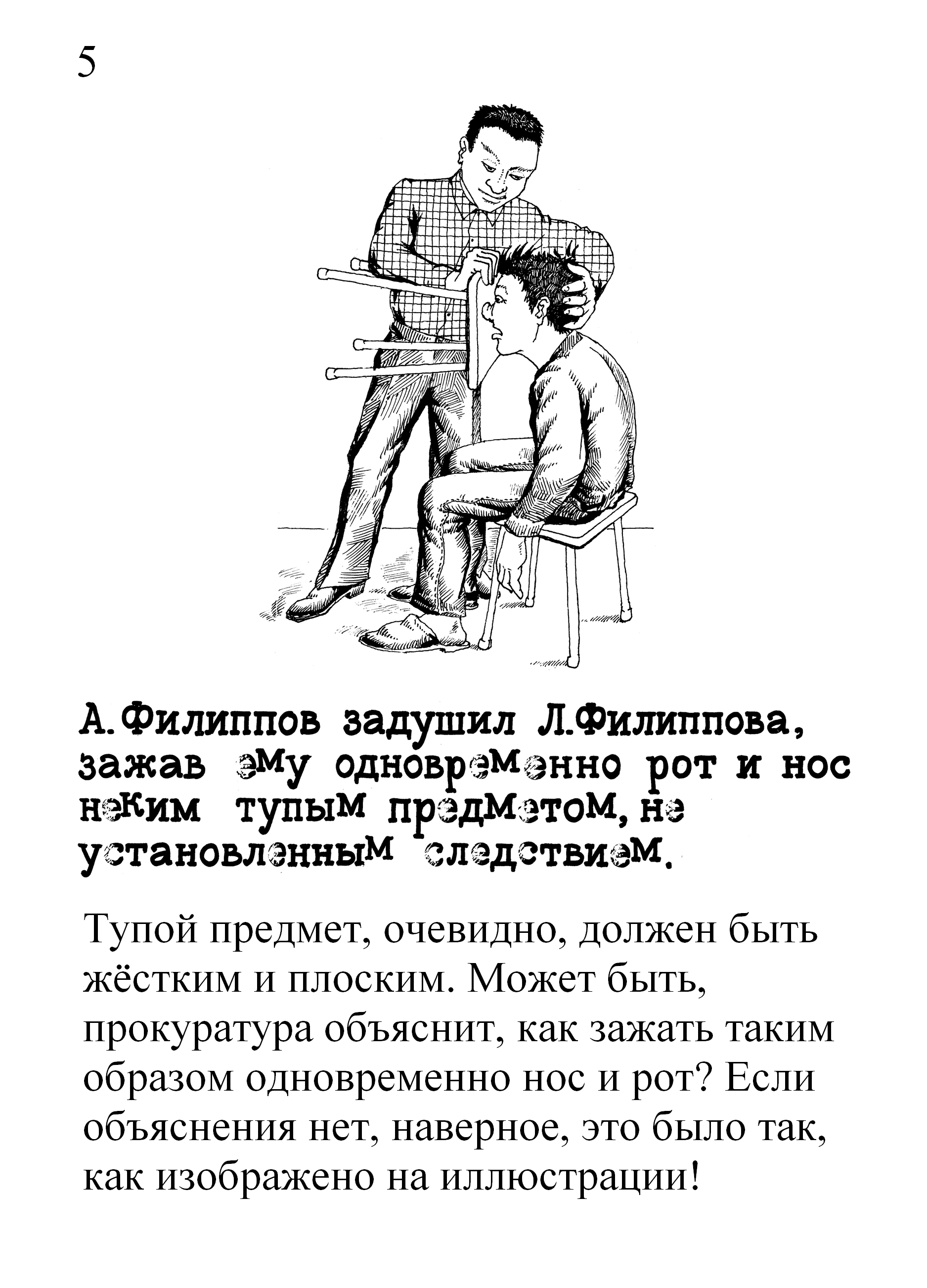 Удушение табуреткой